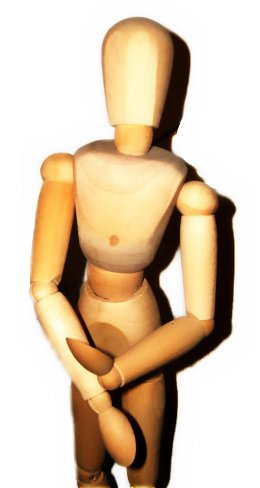 Modello in legno per la rappresentazione di figure umane